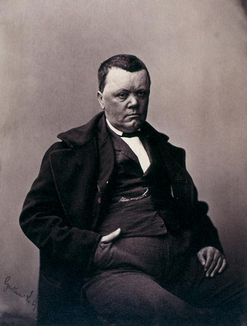 Portrait de Mestral, tirage salé albuminisé, 23,3 x 17,5 cm, v. 1856. Collection de la Société française de photographie.